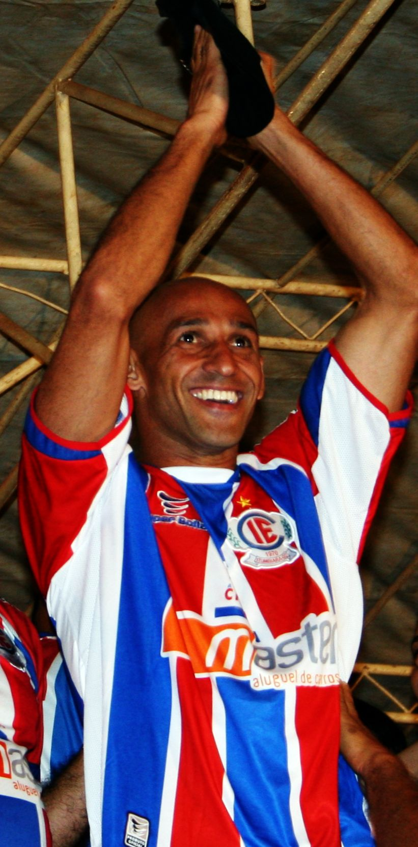 Basílio comemorando o titulo do Itumbiara